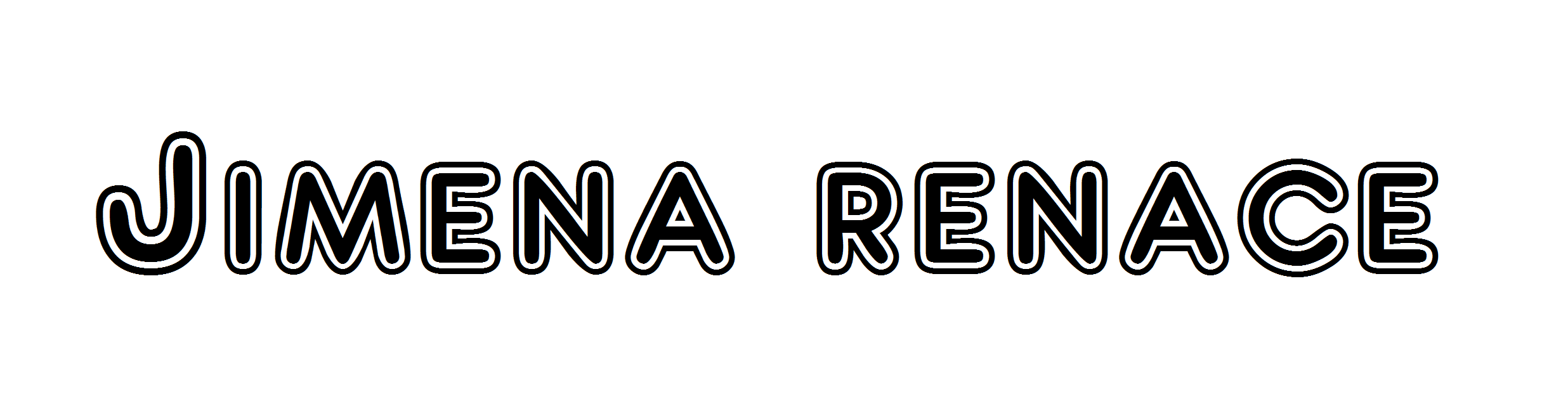 Jimena Renace logo